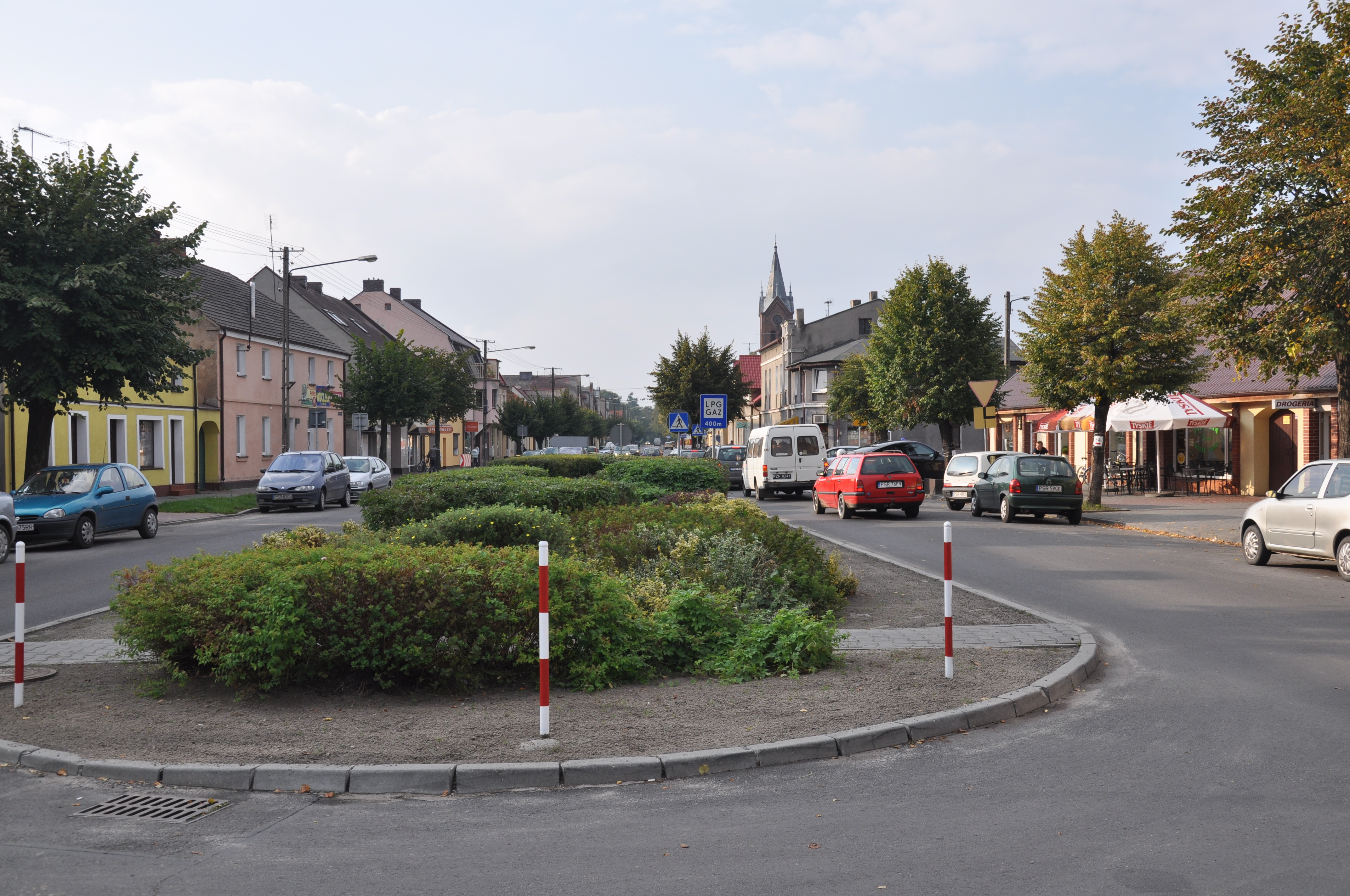 Zaniemyśl - ulica